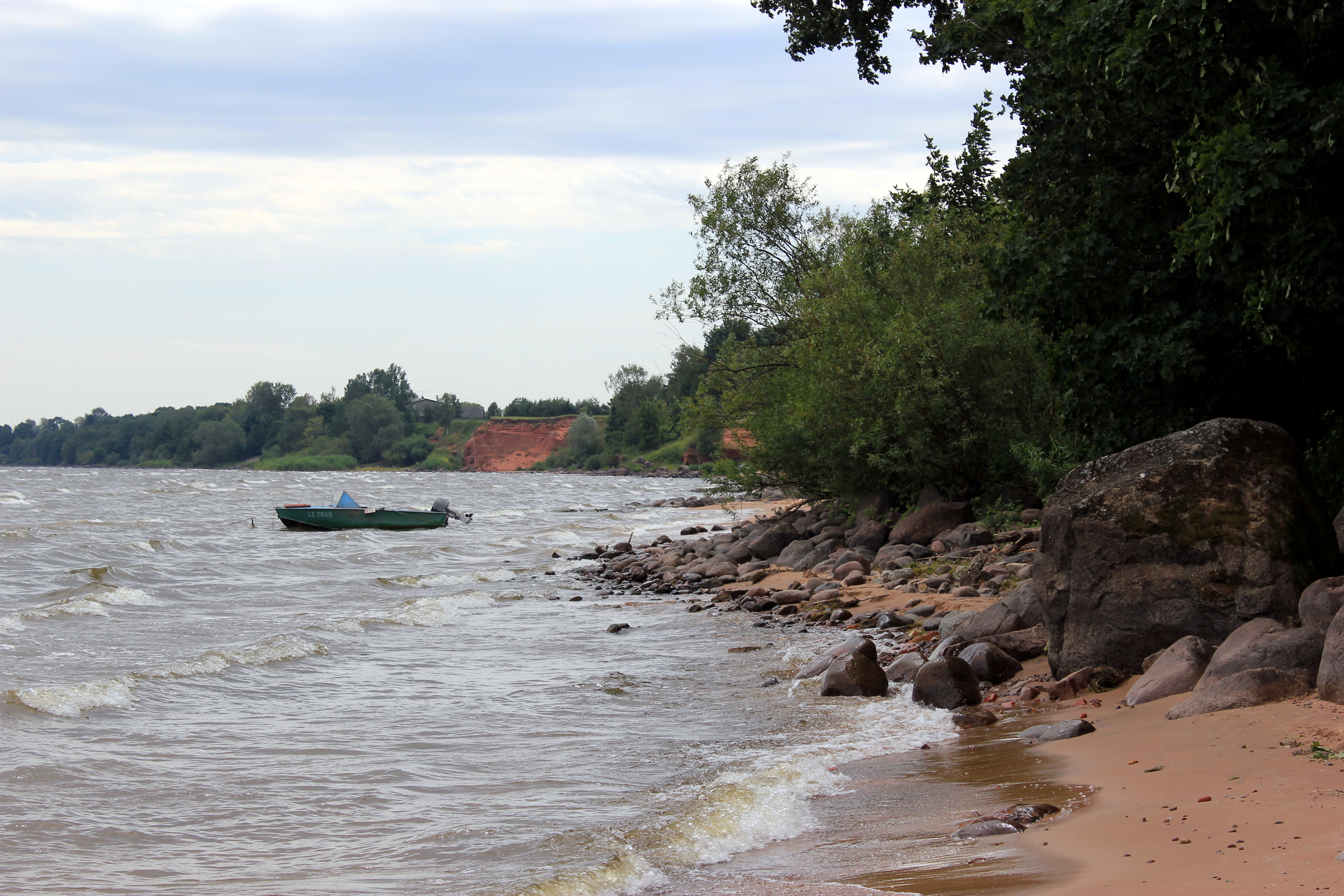 Am Peipussee in Kallaste, Estland.Hornjoserbsce: Při Peipuskim jězorje pola Kallaste, Estiska.